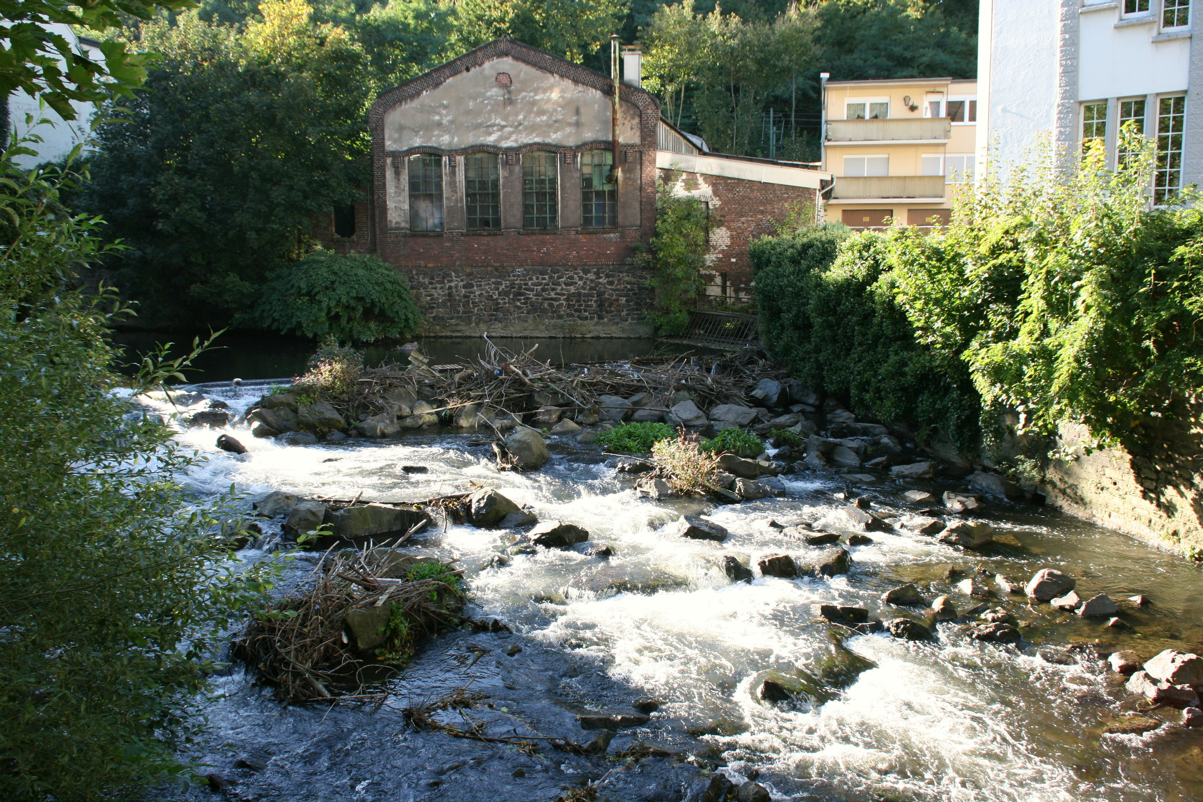 Die Ennepe an der Frankstraße in Hagen